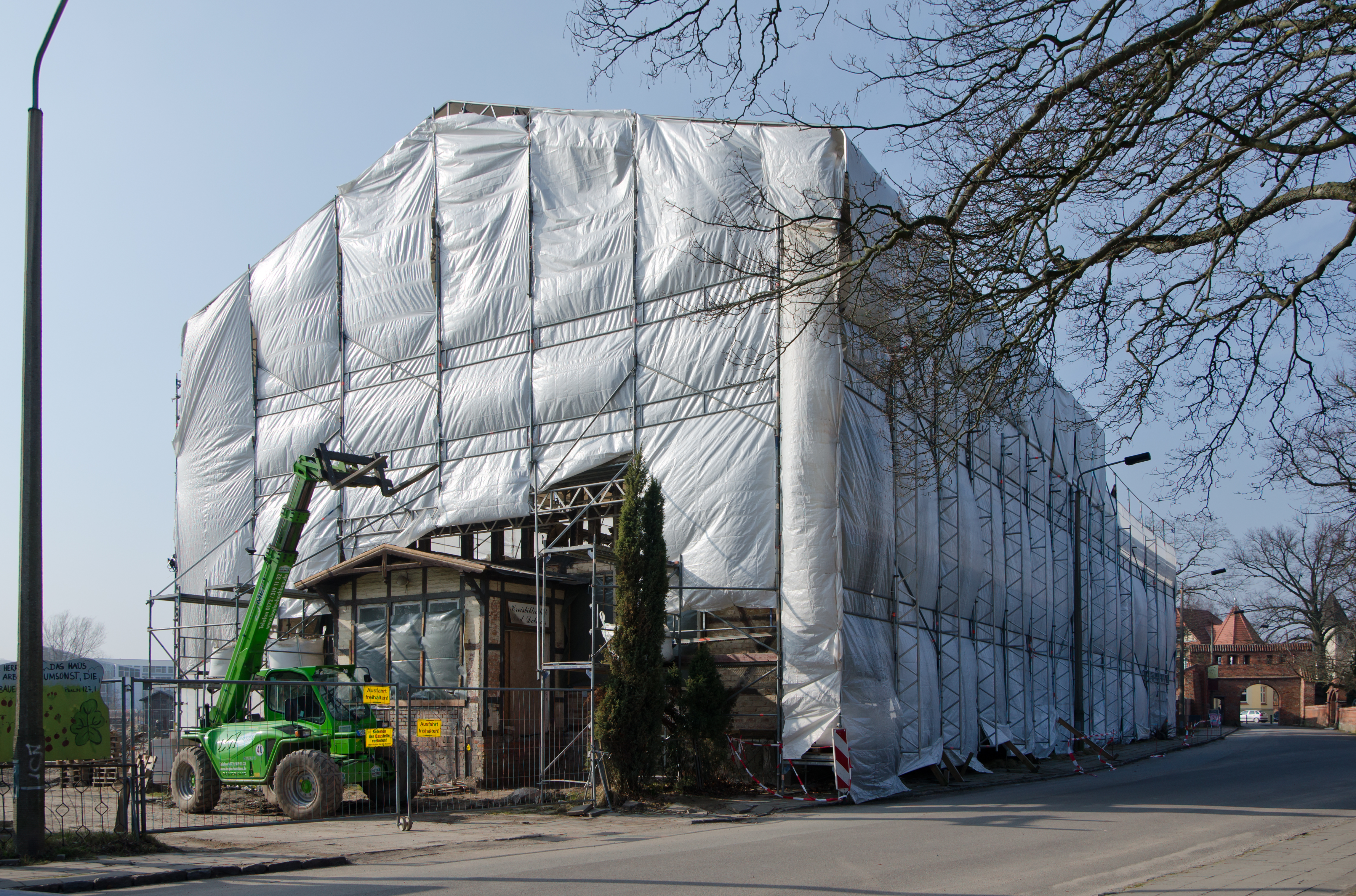 Amtshaus Bad Doberan während der Sanierung 2014